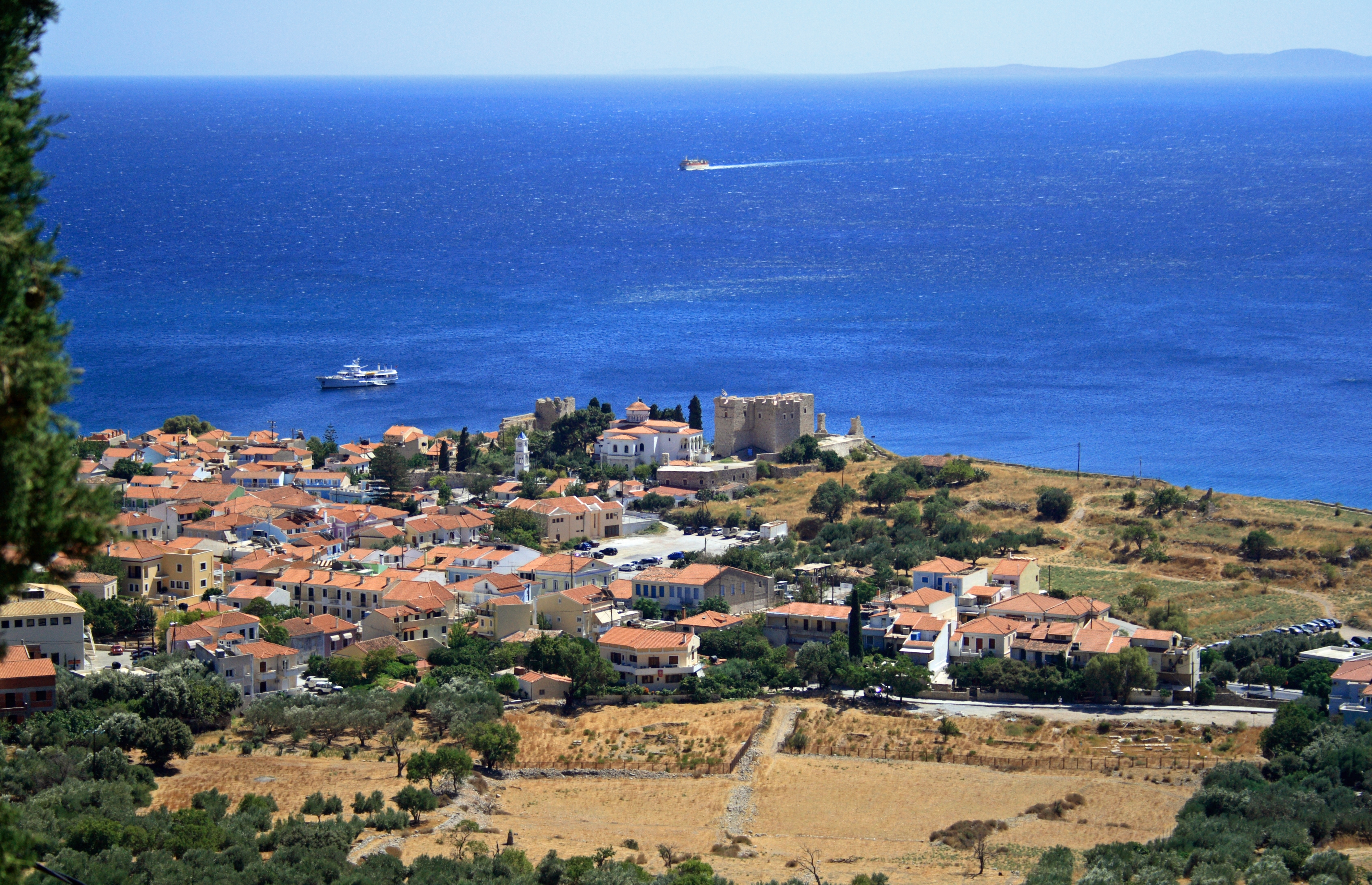 Blick auf Pithagorio von Moni Spilianis